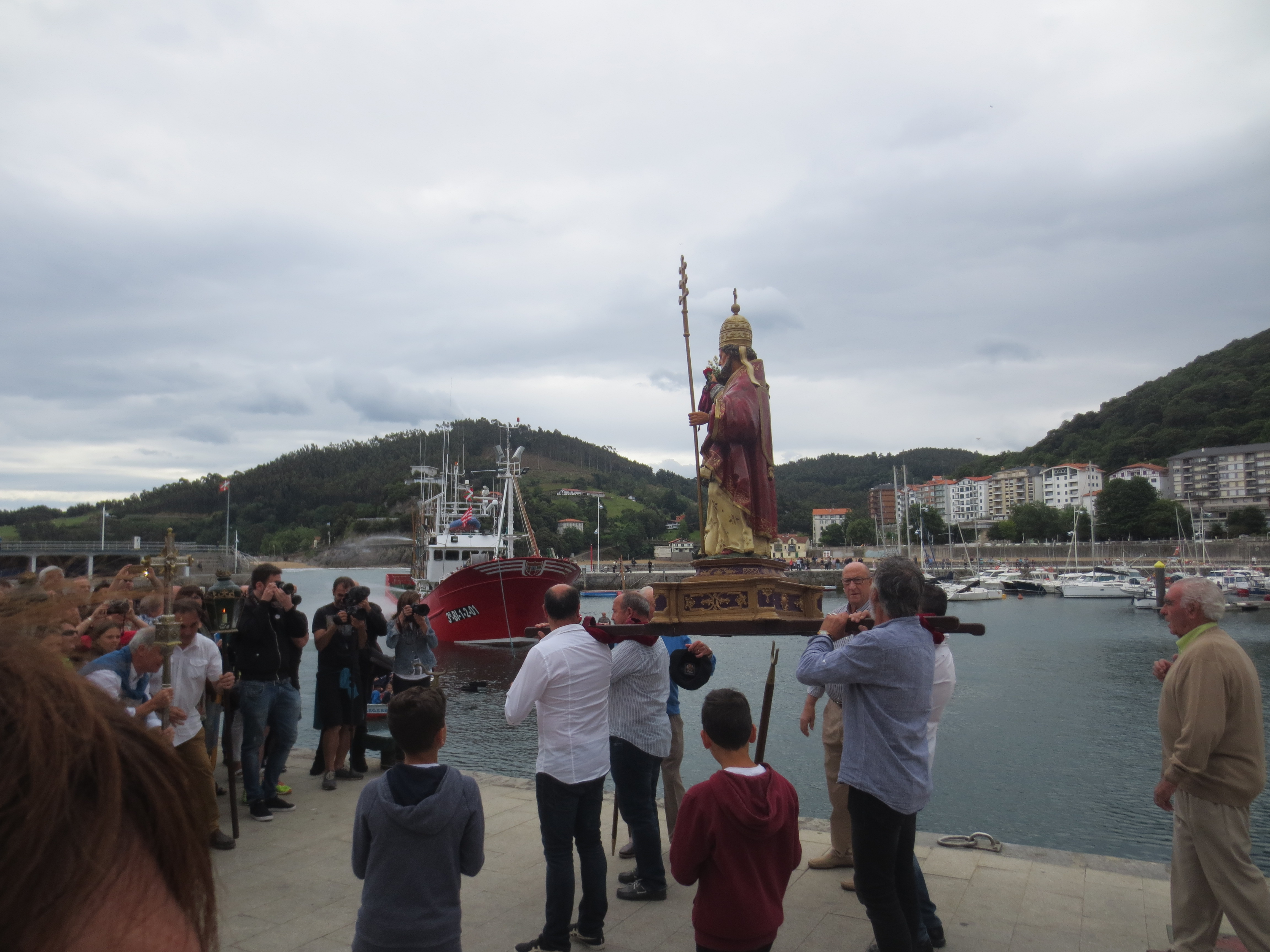 Lekeitioko Kilin-kala. San Pedro eguneko erritoa.